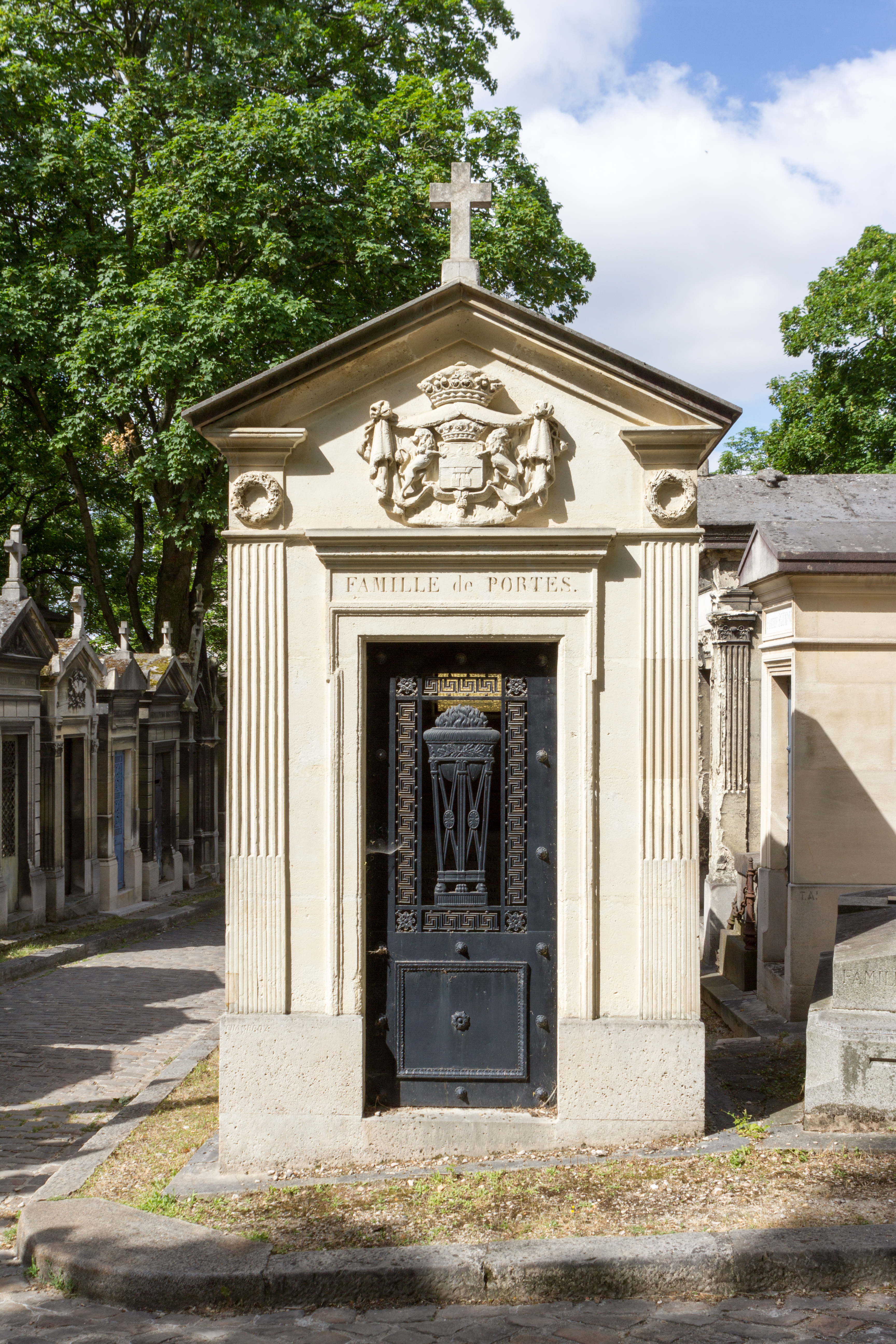 sépulture d'Adolphe François René de Portes (1790-1852), député de l'Ariège.